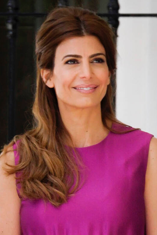 La primera dama, Juliana Awada, recibió en la Quinta de Olivos a la primera dama China, PengLiyuan.